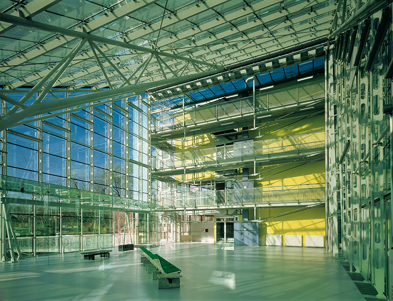 Aula Informatik-Mittelschule Kinkplatz